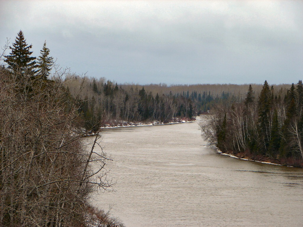 Abitibi River at Iroquois Falls, Ontario, Canada